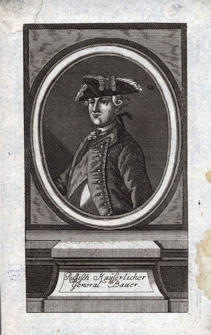 Бауэр, Фридрих Вильгельм